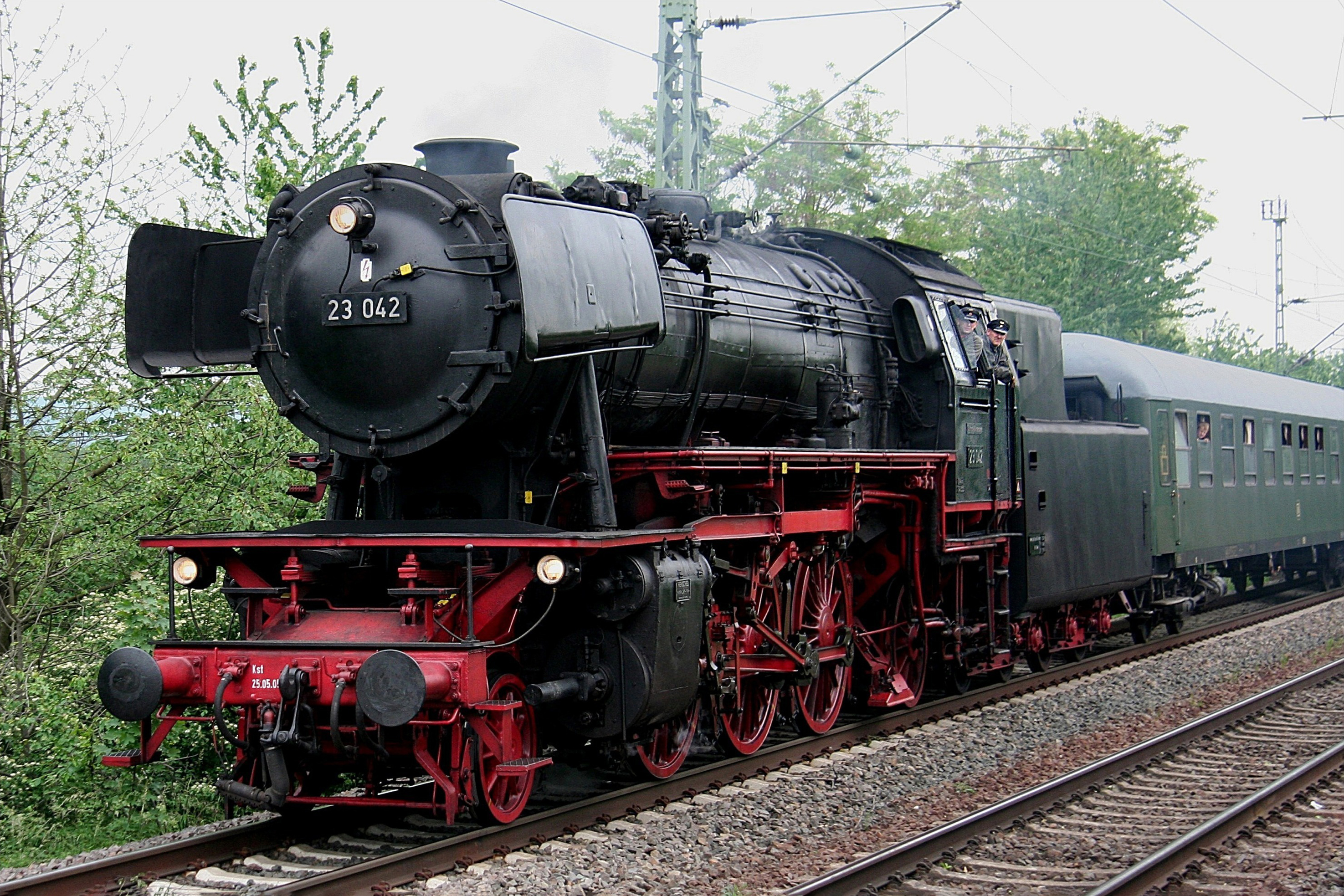 Dampflok 23 042 des Eisenbahnmuseums Darmstadt-Kranichstein vor dem Haltepunkt Urmitz bei einer Sonderfahrt auf der Strecke Koblenz – Neuwied